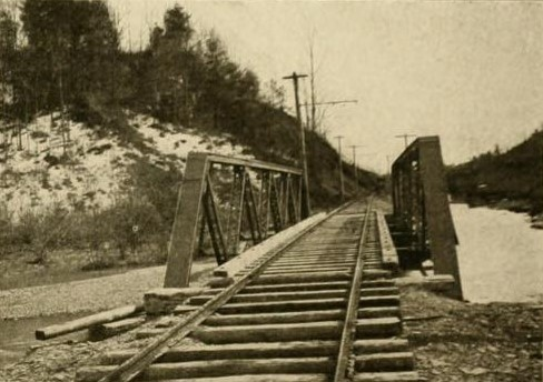 Elmira and Seneca Lake Railway - Brücke